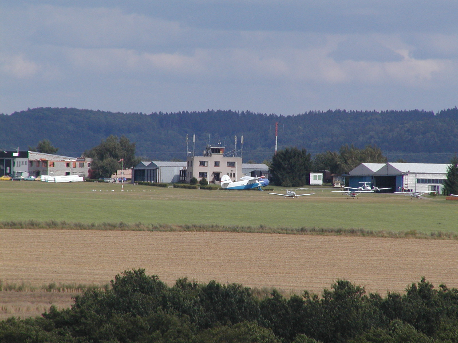 Letiště Benešov od západu